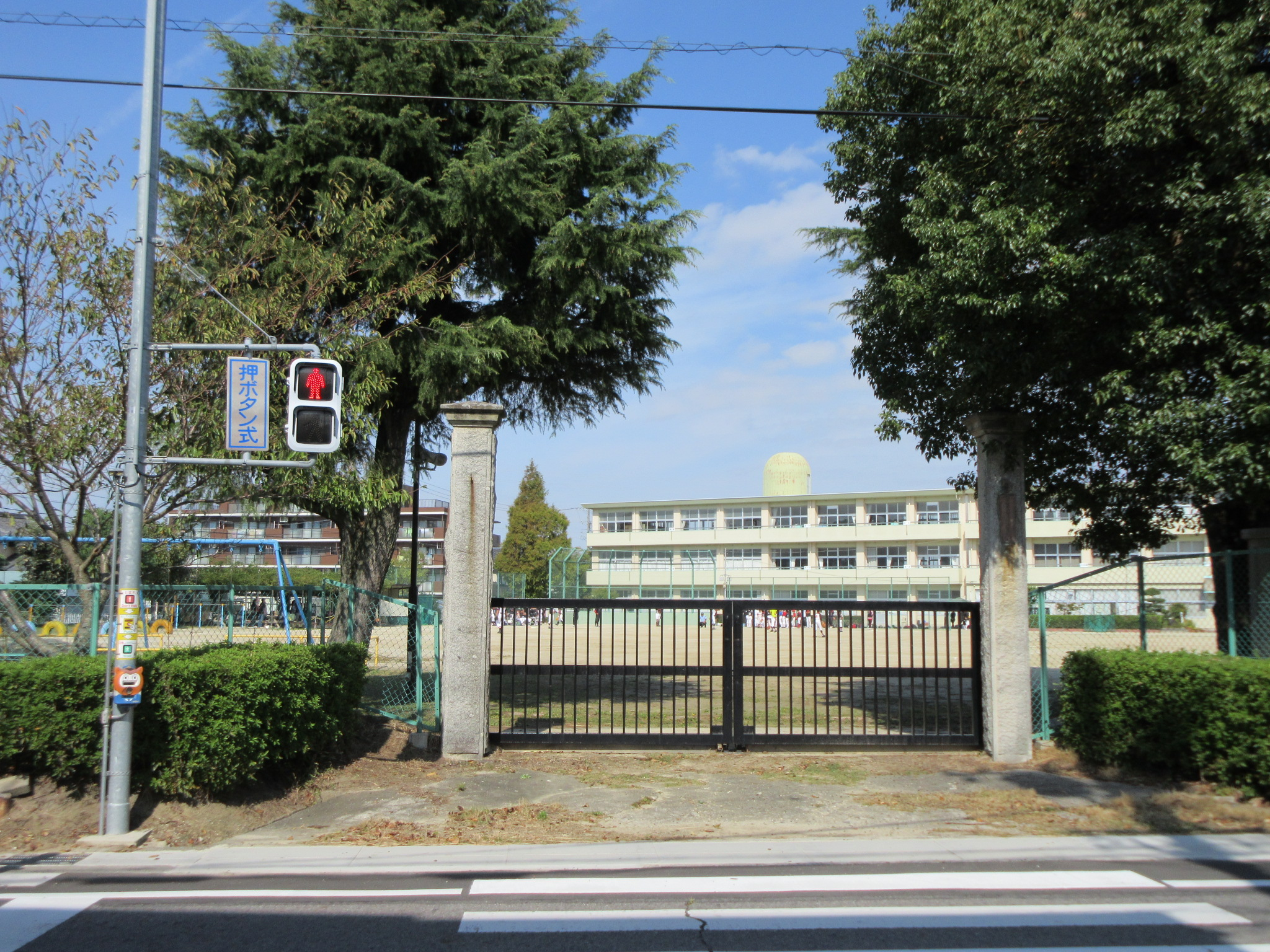 岡崎市立六ツ美南部小学校（岡崎市中島町）